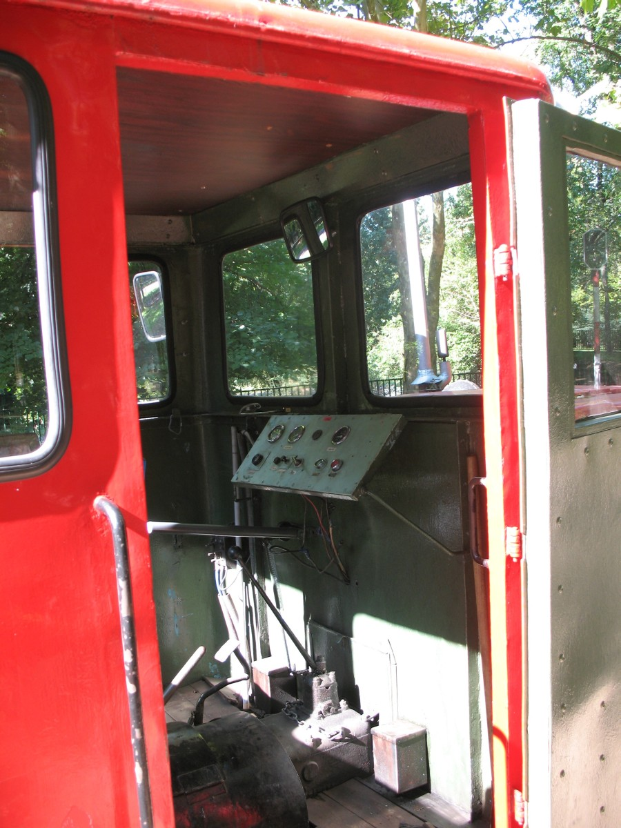 Ez a kép a debreceni állatkertben található kisvasut mozdonyának belsejét mutatja be. Az irányítópultról egy közelebbi kép.